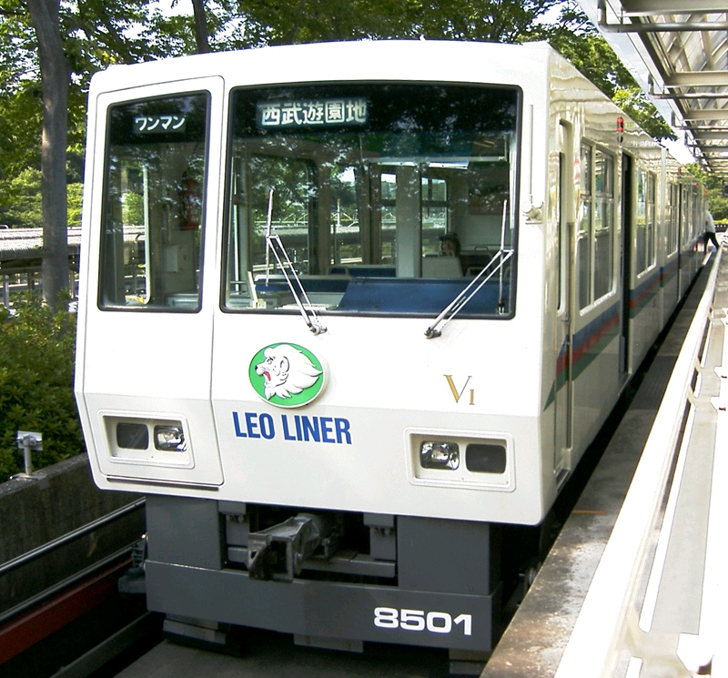 Seibu_Yamaguchi Line 8501Model